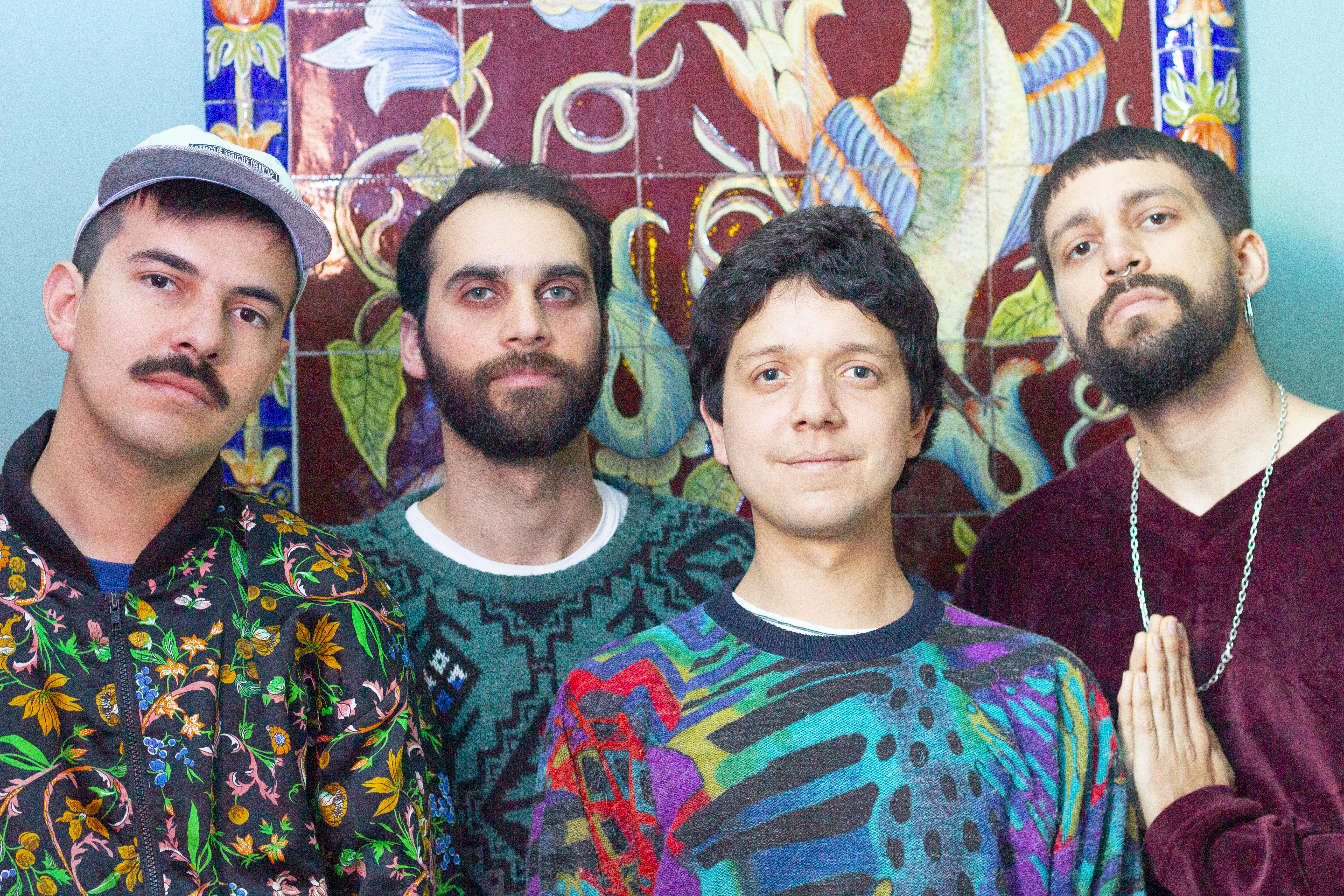 Mundaka en el 2019: Lucas, Mateo, Rodrigo y Richard.